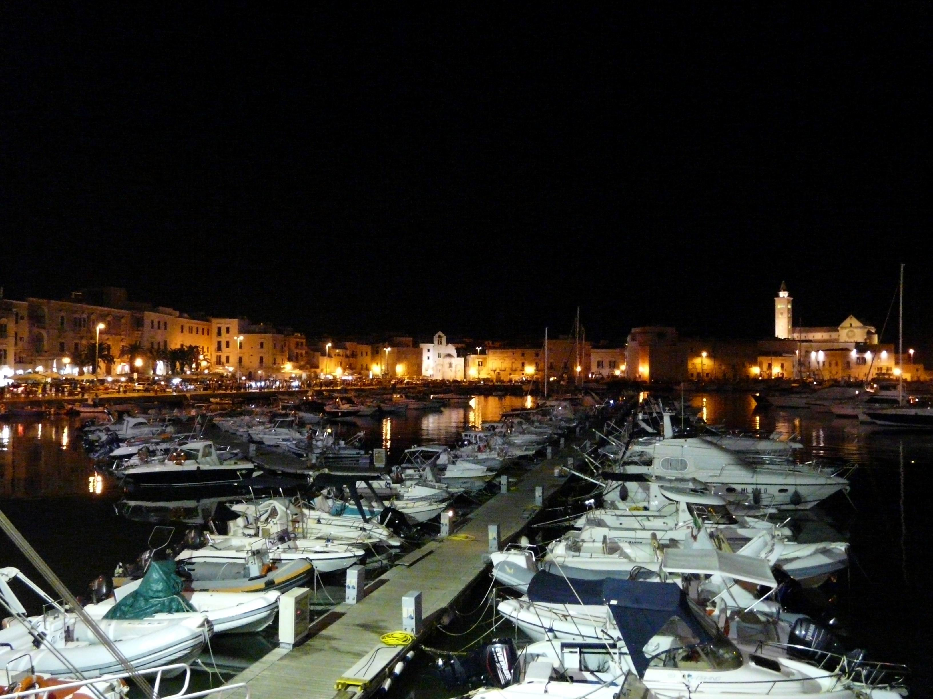 Trani, il centro storico ed il porto di notte